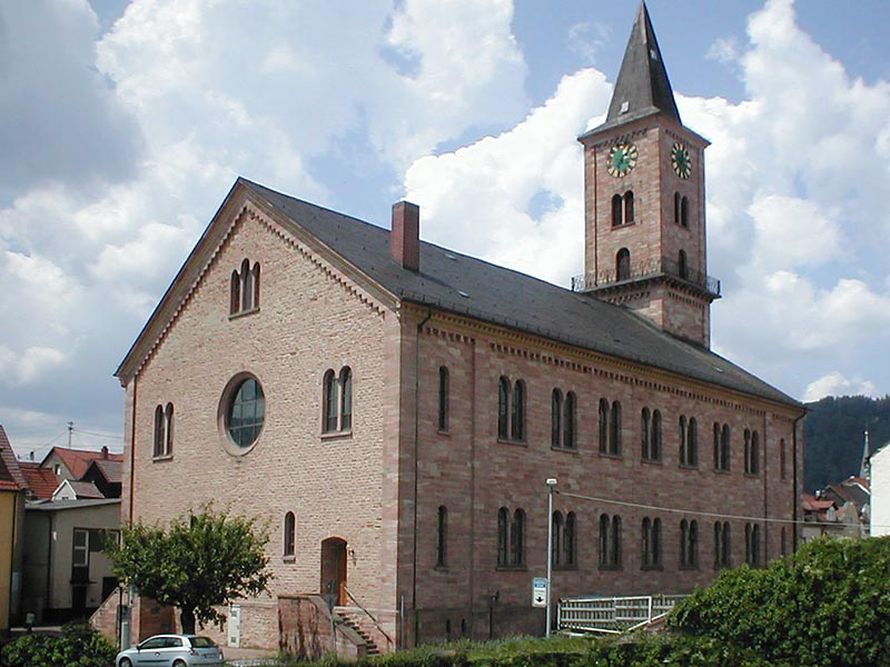 Evangelische Kirche in Eberbach/Neckar